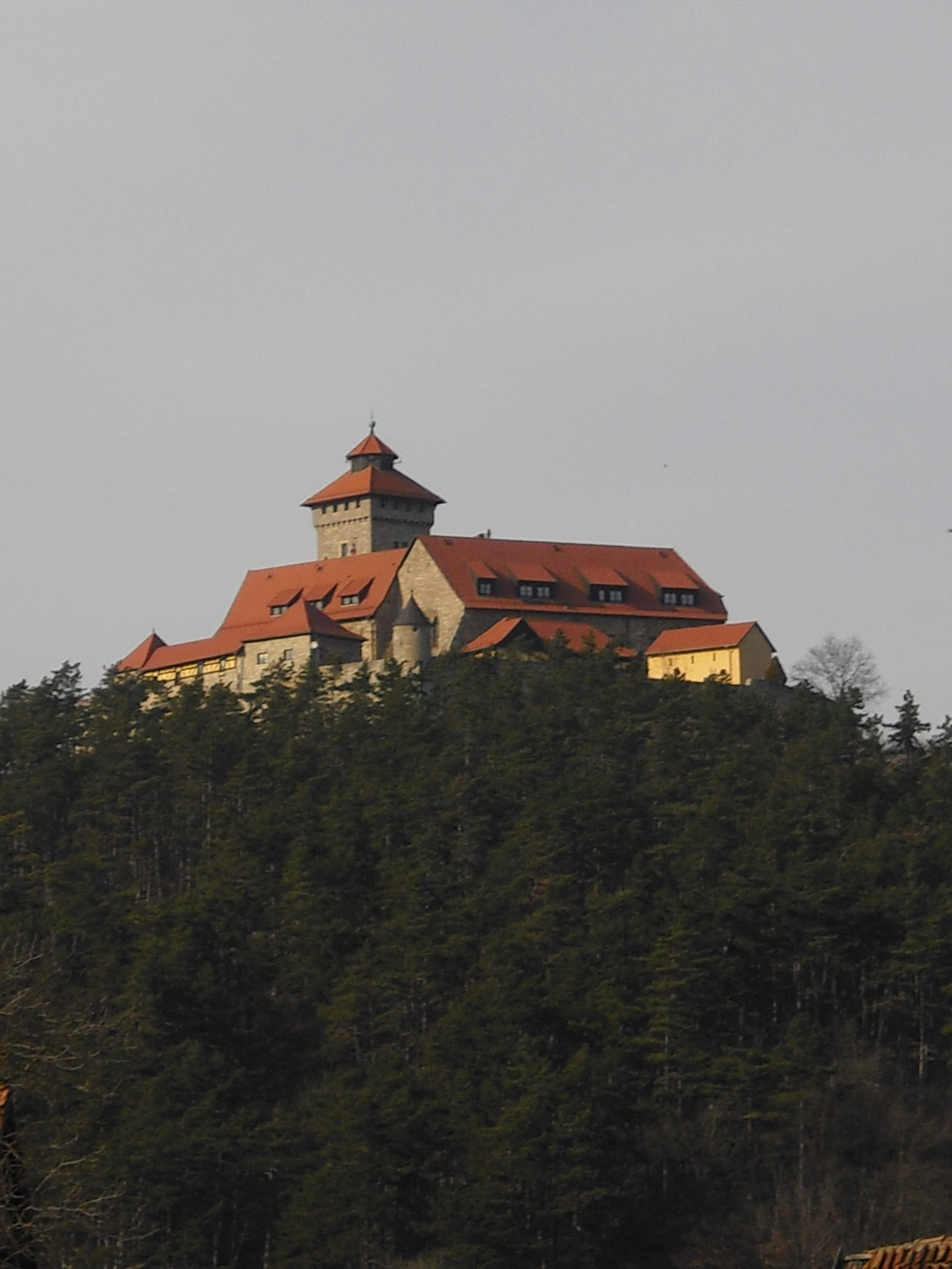 Wachsenburg Südseite